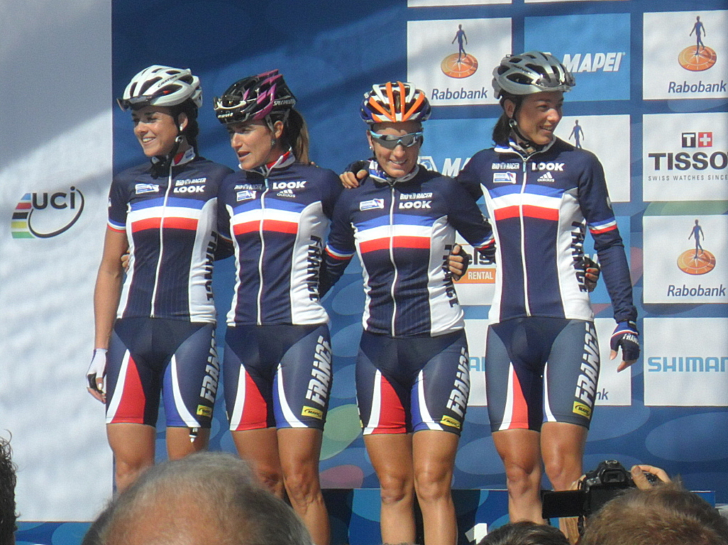 Ploegenpresentatie Frankrijk voor de start van het Wereldkampioenschap 2012 in Valkenburg, Nederland.